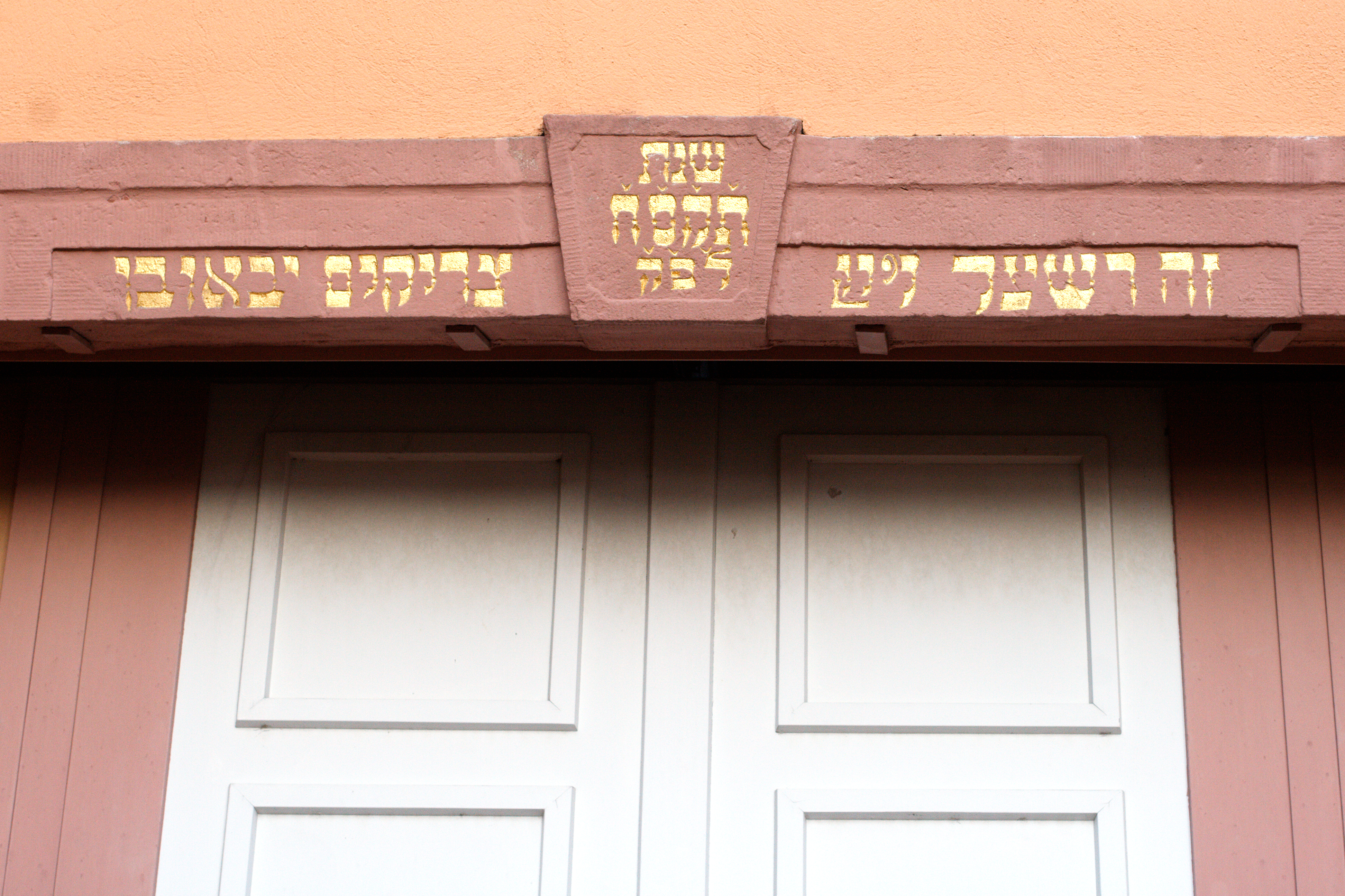 Inschrift über dem Eingang der ehemaligen Synagoge in Kleinheubach (Bayern).